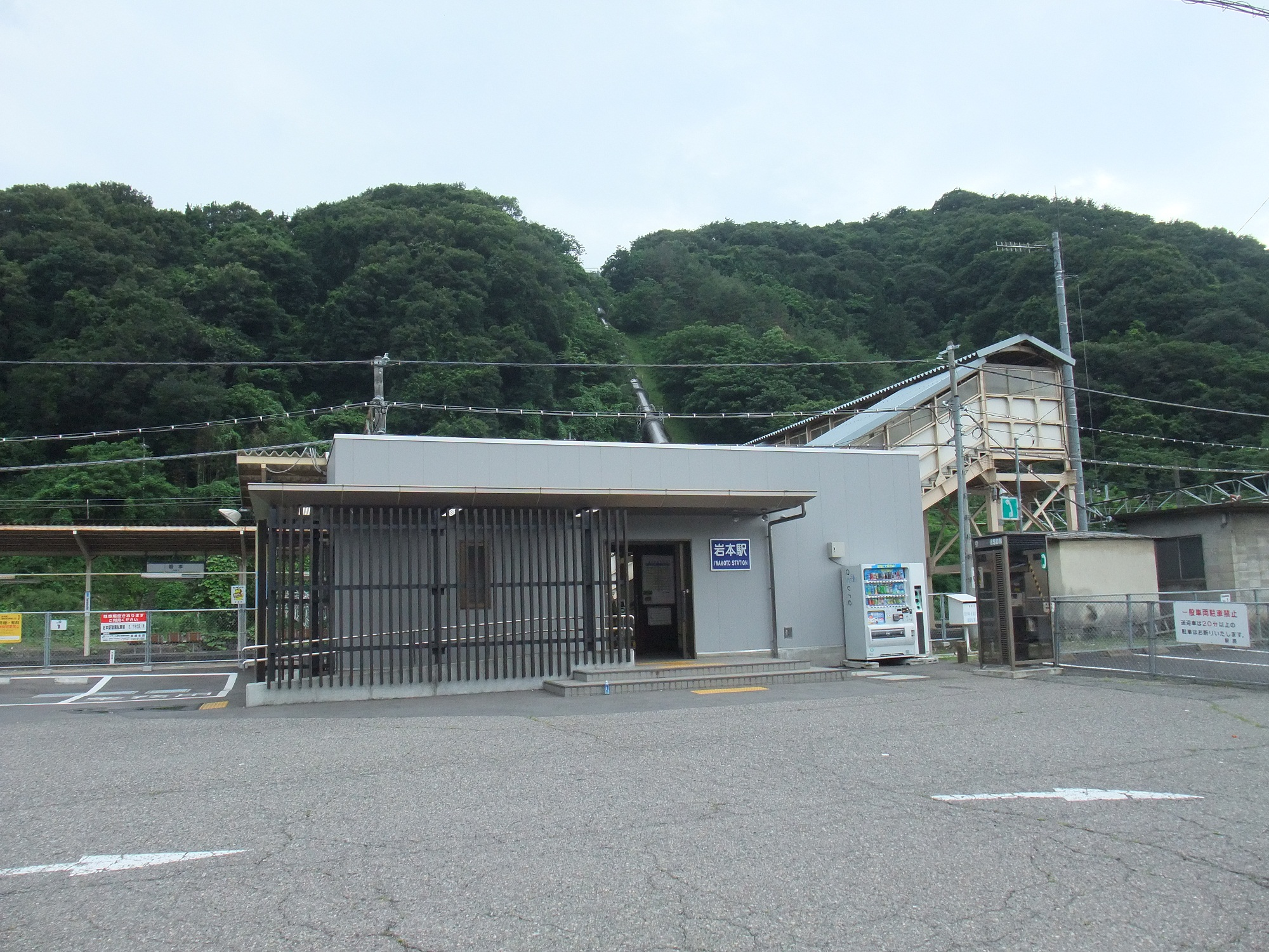 岩本駅(上越線)